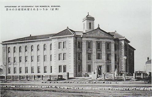 Department of Mongolia politics of Manchukuo（满洲国蒙政部）